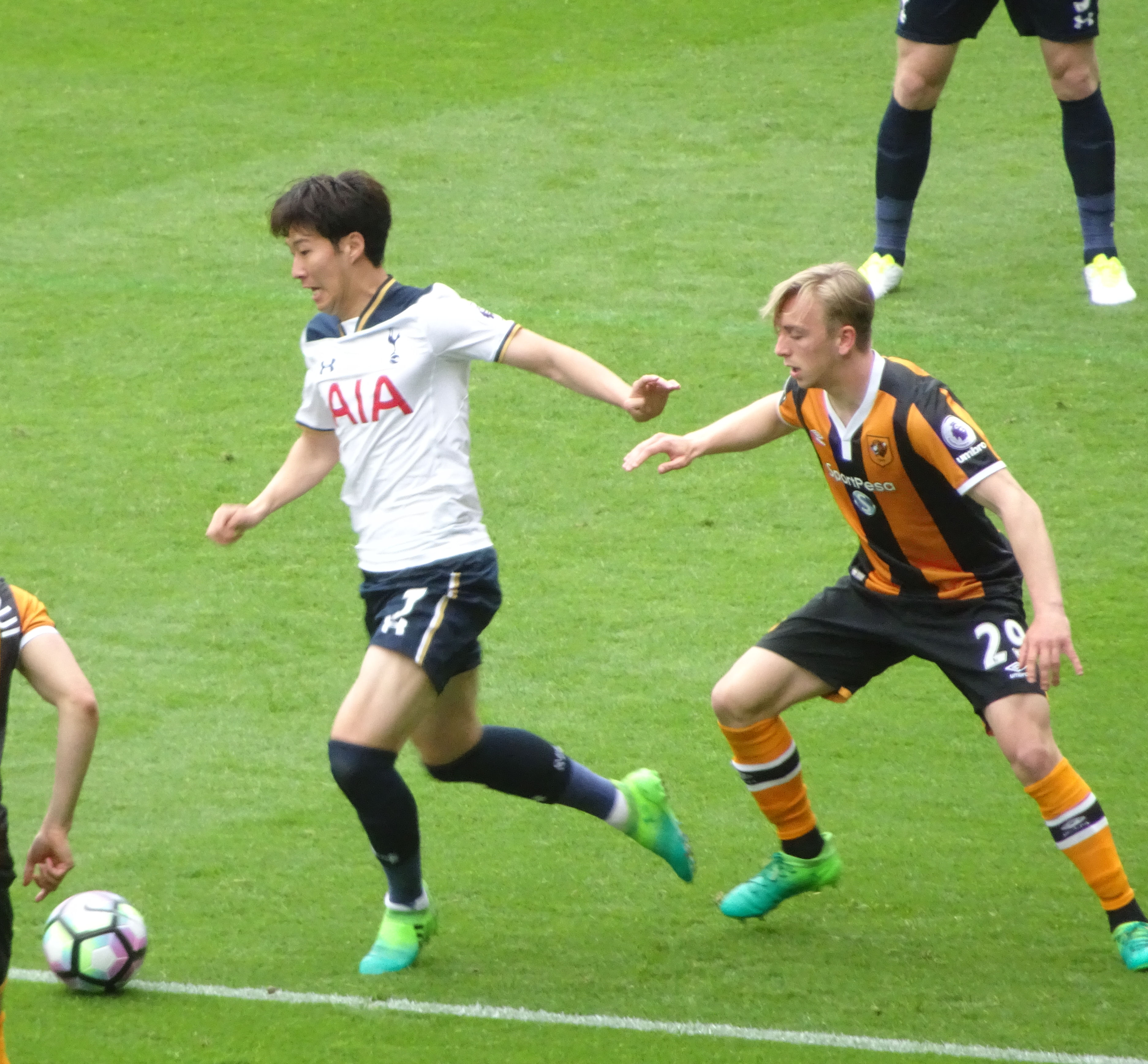 Heung-min Son & Jarrod Bowen